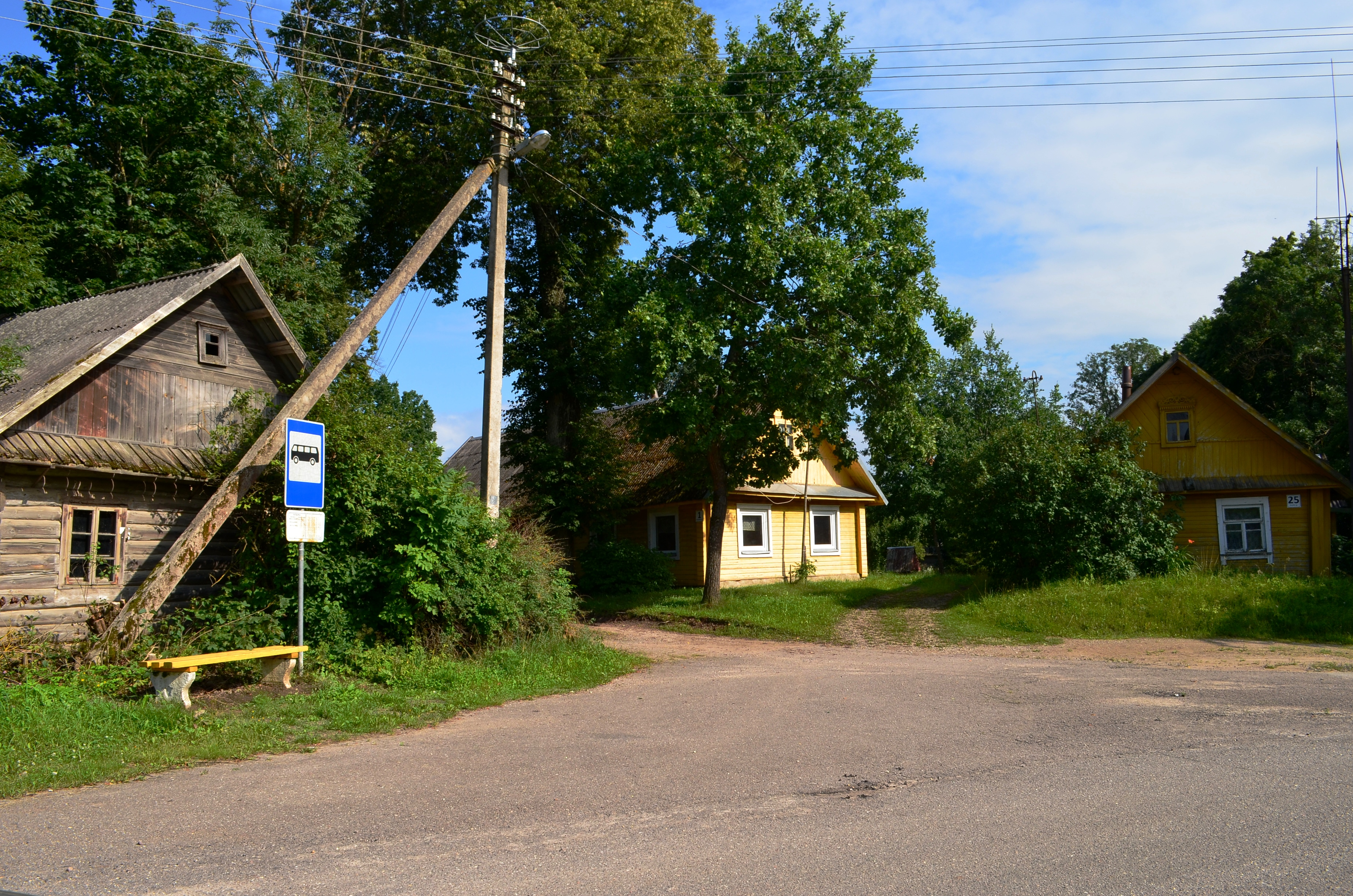 Guntauninkų k., Mielagėnų sen., Ignalinos raj.